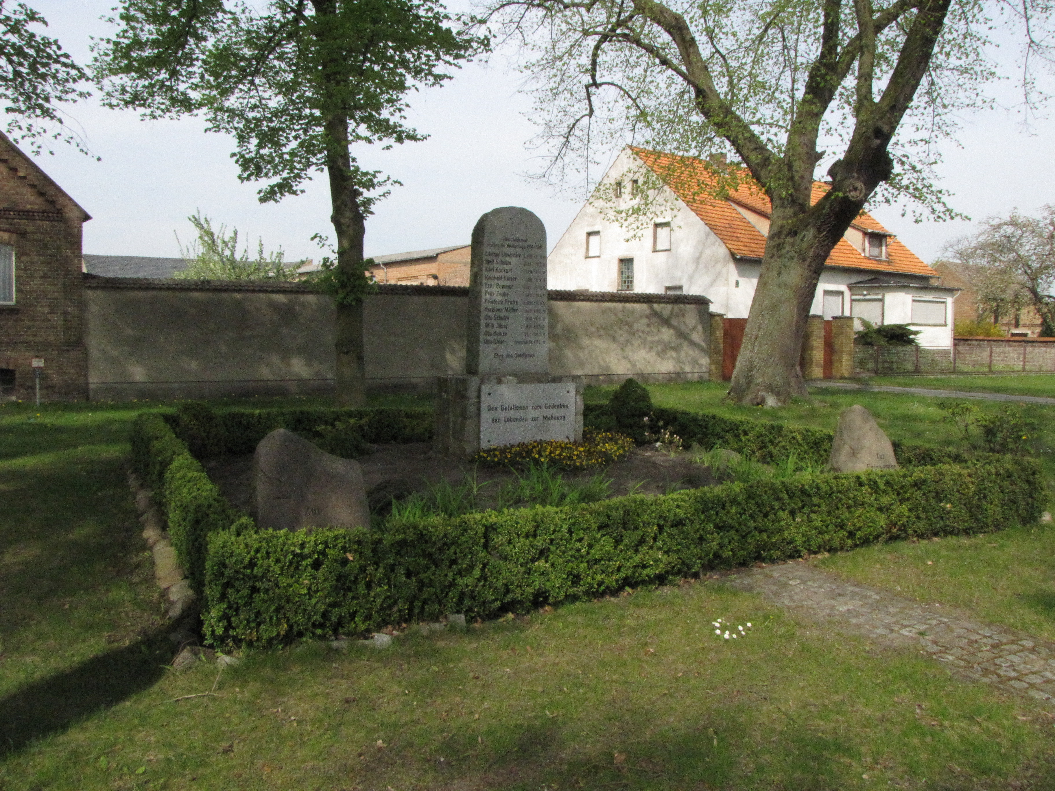 Kriegerdenkmal in der Nächst Neuendorfer Dorfstraße in Nächst Neuendorf, Stadt Zossen, Brandenburg, Deutschland